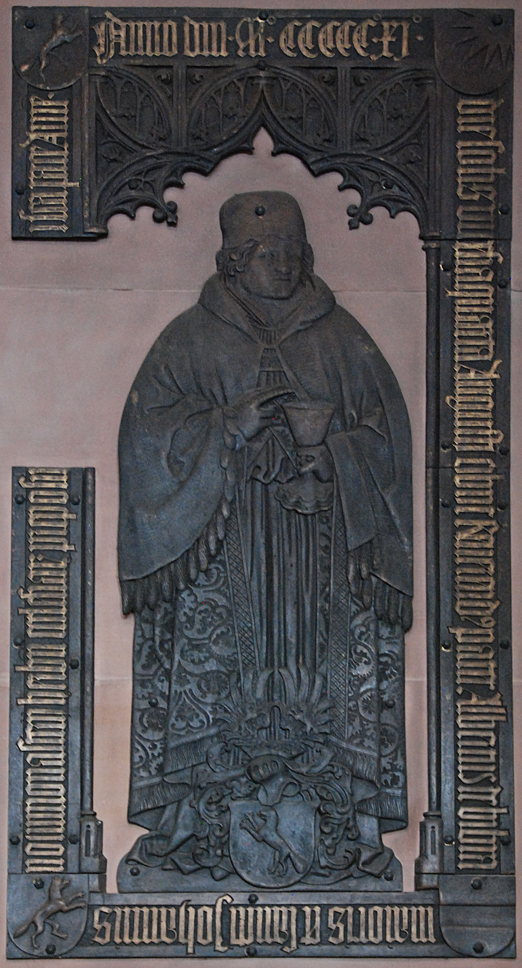 July 2009 photo of Albrecht von Bibra bronze grave plate Wuerzburg Dom